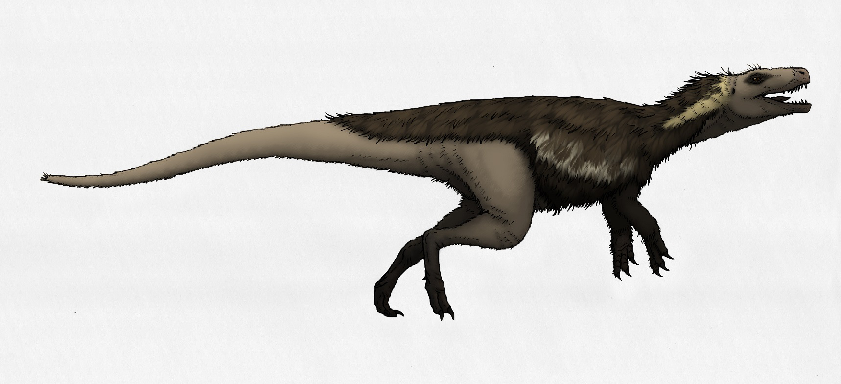 Gnathovorax cabreirai. Credits to Scott Hartman.